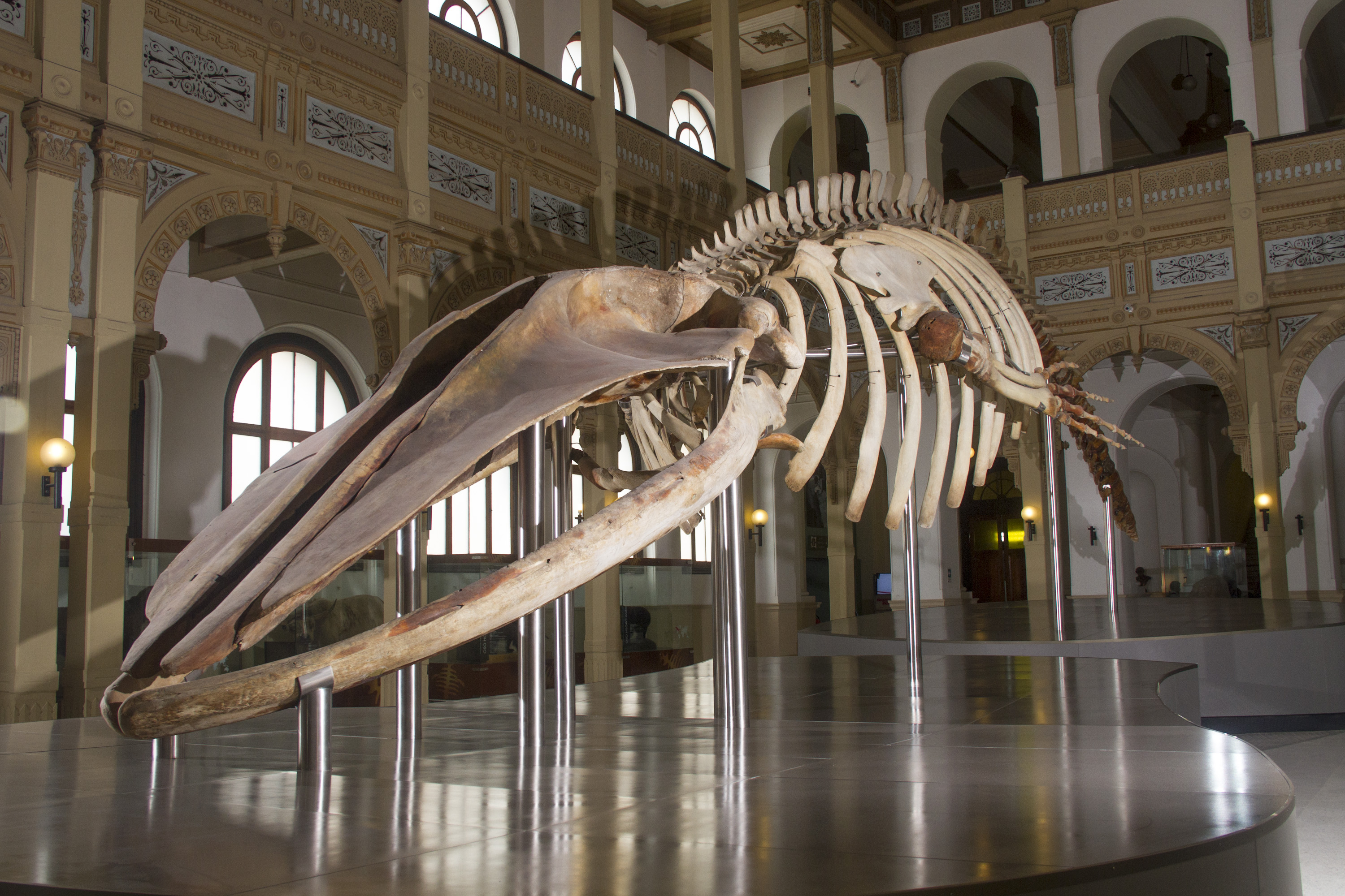 Esqueleto de balaenoptera borealis o rorcual norteño, ubicado en el salón central del MNHN